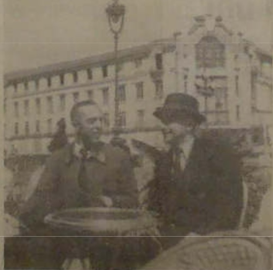 Olier Mordrel & François Debeauvais à Rennes à la sortie de prison de ce dernier, publié dans Breiz Atao du 30 juillet 1939